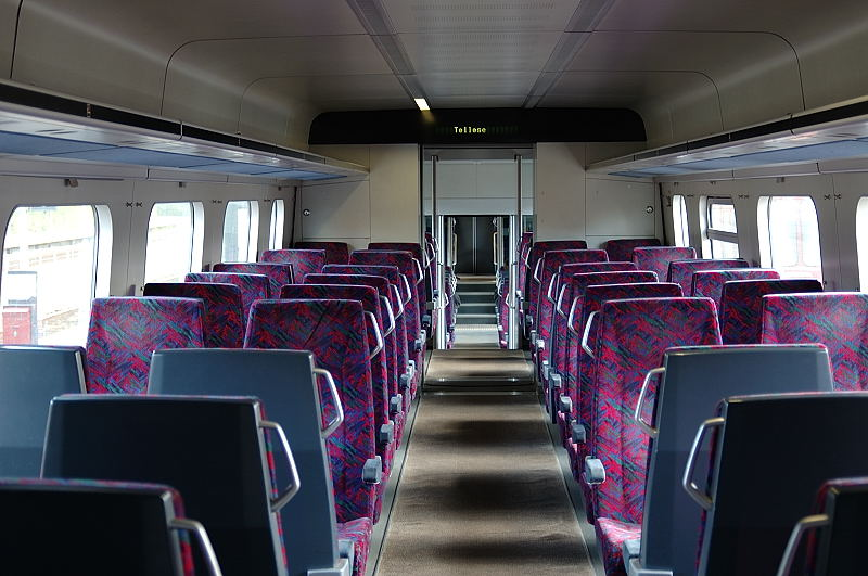 Interior of Vestsjællands Lokalbaner IC2 DMU MF1023